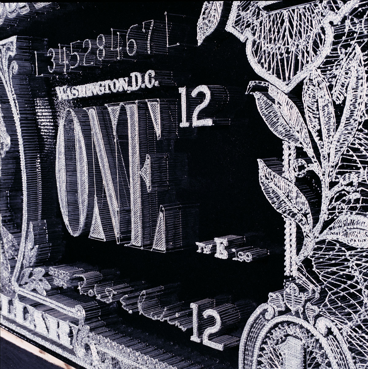 Merca // 232 x 99 x 28cm // clavos, hilo de plata y resina sobre madera